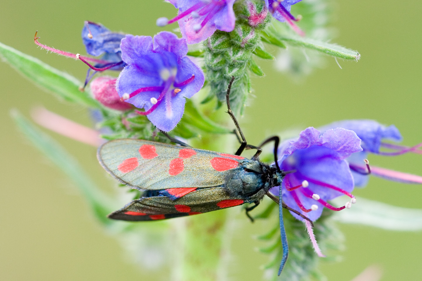 Zygaena filipendulae